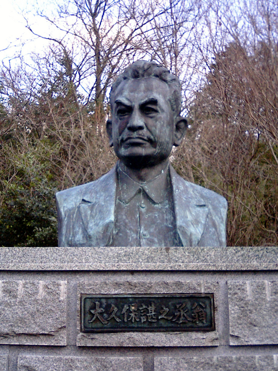 大久保諶之丞（胸像） - 日本国香川県三豊市財田町（香川用水記念公園付近）